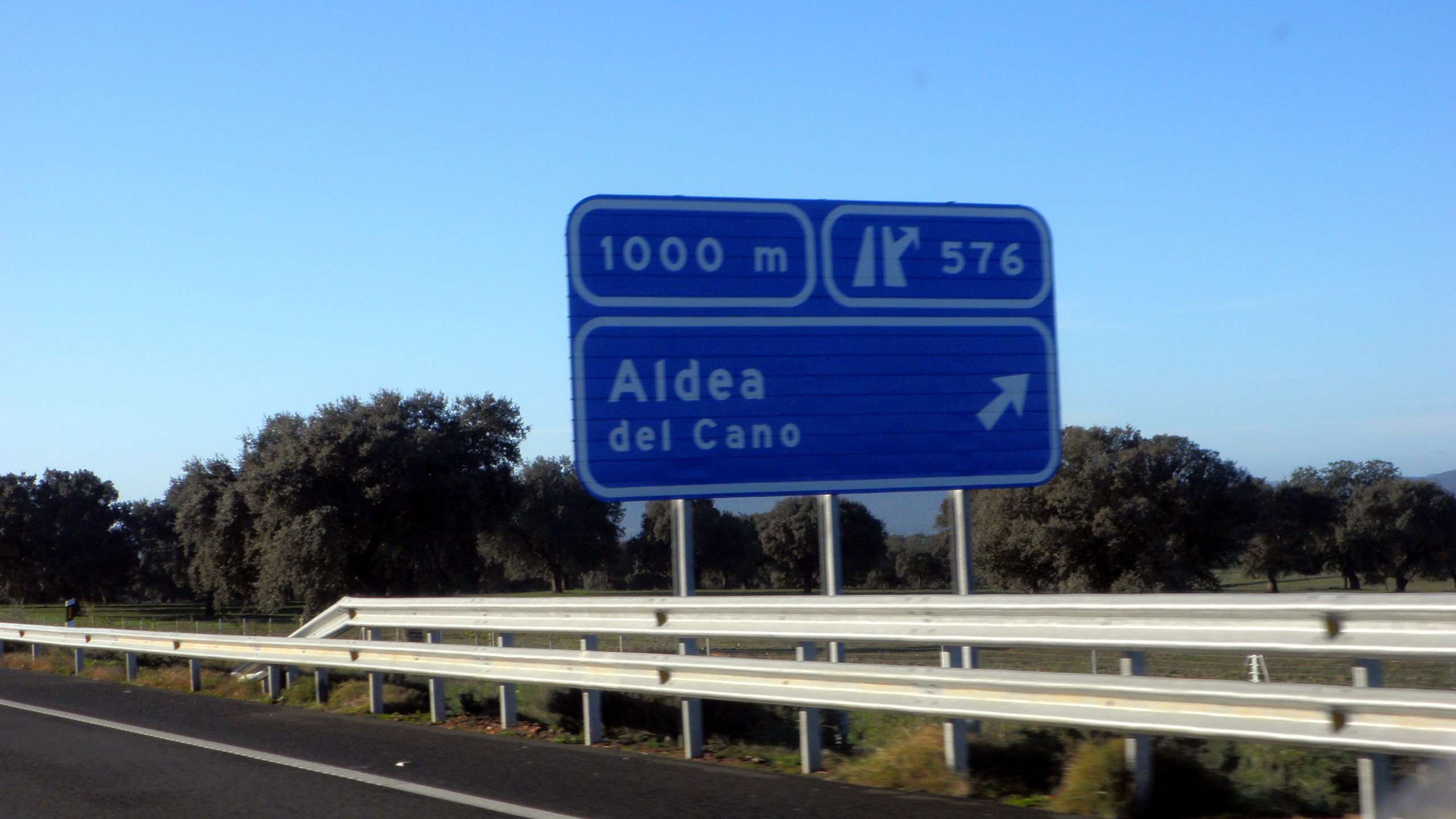 Salida a Aldea del Cano desde la Autovía de la Plata A-66. Provincia de Cáceres, España.